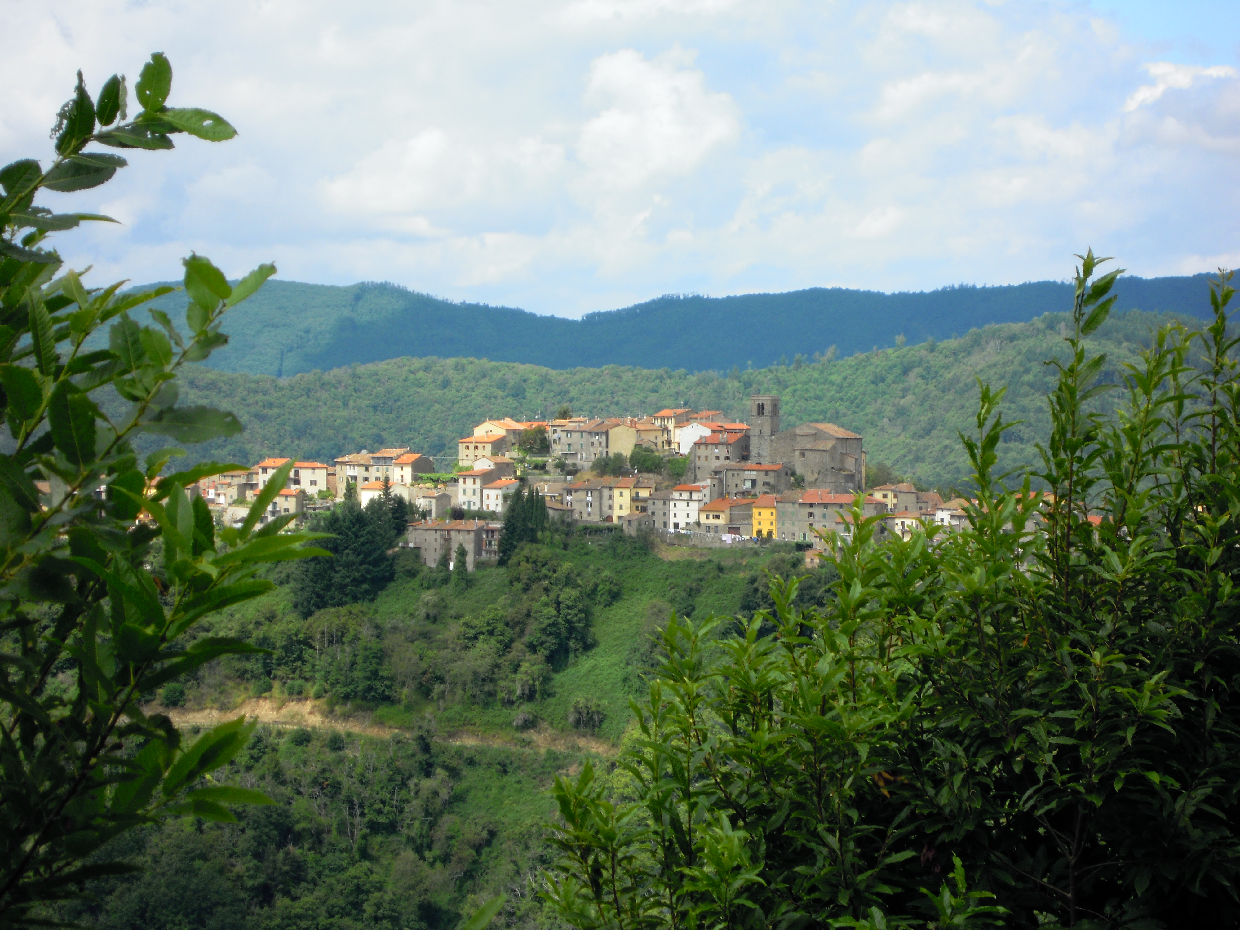 Uno scorcio del borgo medievale di Serra Pistoiese (Pistoia)